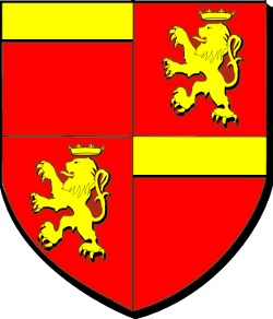 Blasone della famiglia dei conti di Ventimiglia, visconti di Marsiglia.